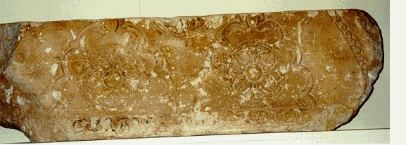 Fragmento de tímpano de la iglesia San Nicolás de Soria (actualmente en ruinas). Fue descubierto en 1970 durante los trabajos de limpieza y se conserva en el lapidario de San Juan de Duero (Soria). Está decorado con dos arcos polilobulados que acogen rosetas, hay restos de un tercer arco y bajo ellos la inscripción: (obs)CVRAT(us) EST SOL(stitio) ER(a) MCCLX(xvii). La inscripción corresponde a un eclipse total de Sol ocurrido en Soria el 3 de junio de 1239. Imagen tomada por Xgarciaf en Agosto de 2001 y cedida a wikipedia.